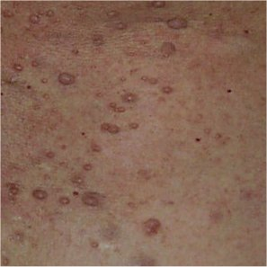 Un appareil photo numérique de marque Olympus Camedia 1400 (1,4Mega pixels)